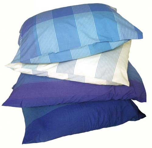 Kanafas moderního designu, vzor Crocus, autor Eva Jandíková